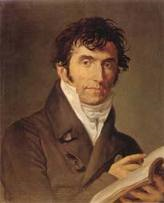 Giuseppe Pecchio (1785-1835)